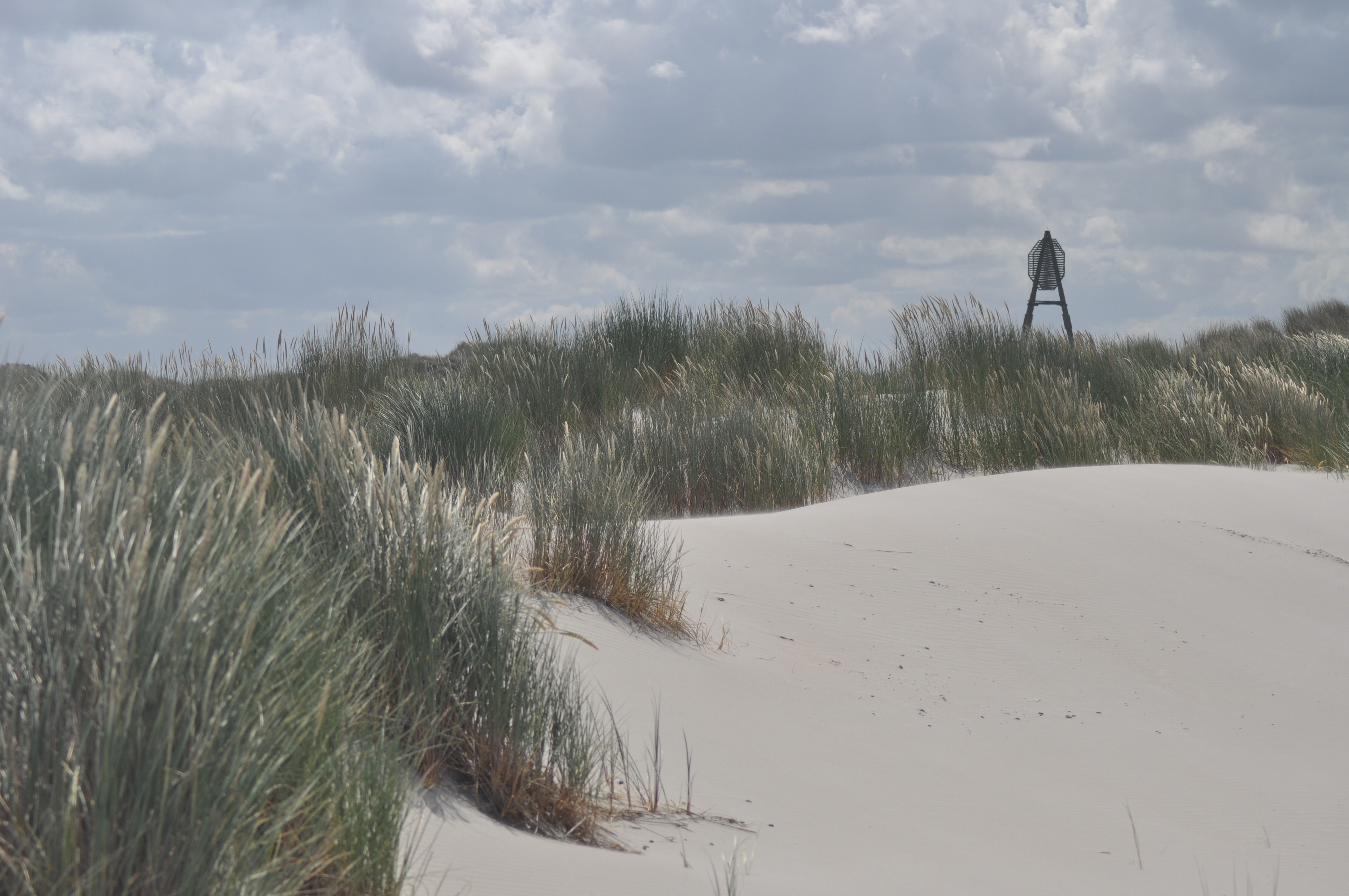 Naturschutzgebiet Het Oerd/De Hon auf der westfriesischen Insel Ameland mit historischer Radarreflektionsbake.